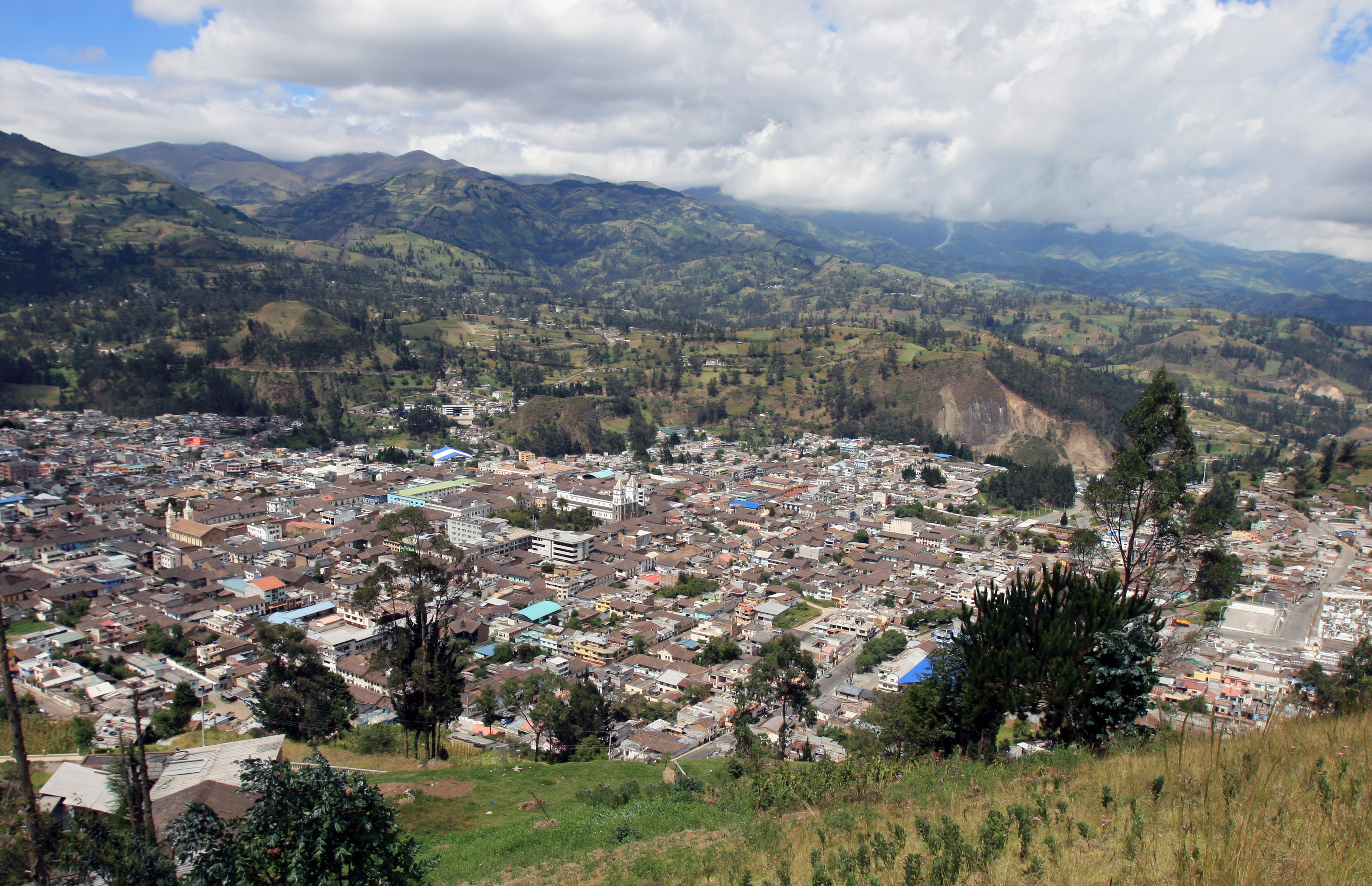 Panorámica de Guaranda, prov de Bolívar